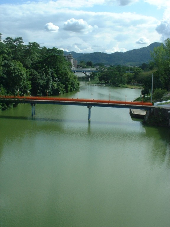 綾川 香川県綾歌郡綾南町（撮影当時。現・綾川町）滝宮 国道32号から南望